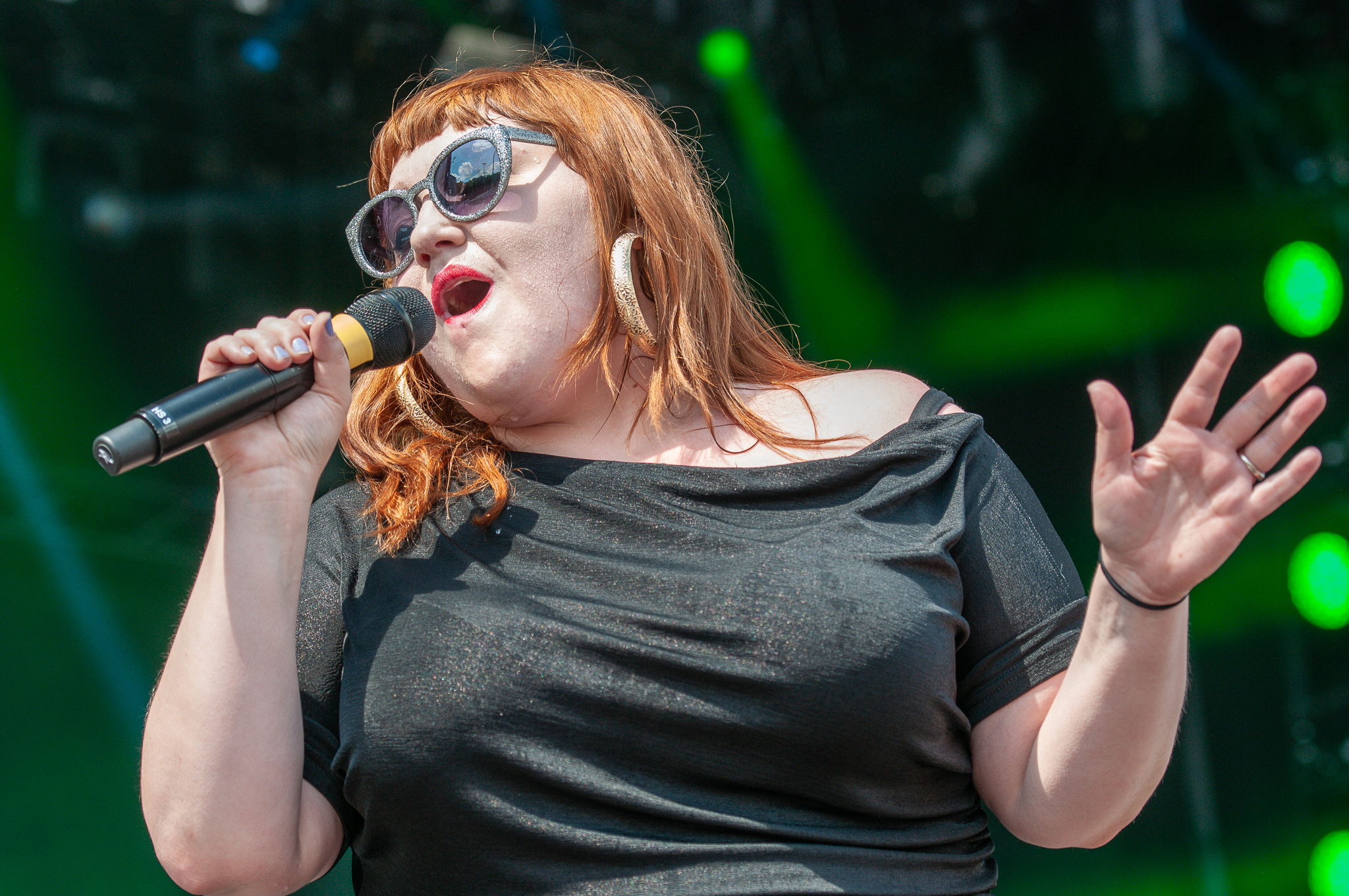 ARGO-Konzerte,Beth Ditto,Festival,Konzert,Livekonzert,Livemusik,Musik,RiP,Rock im Park 2018,Zeppelin Stage